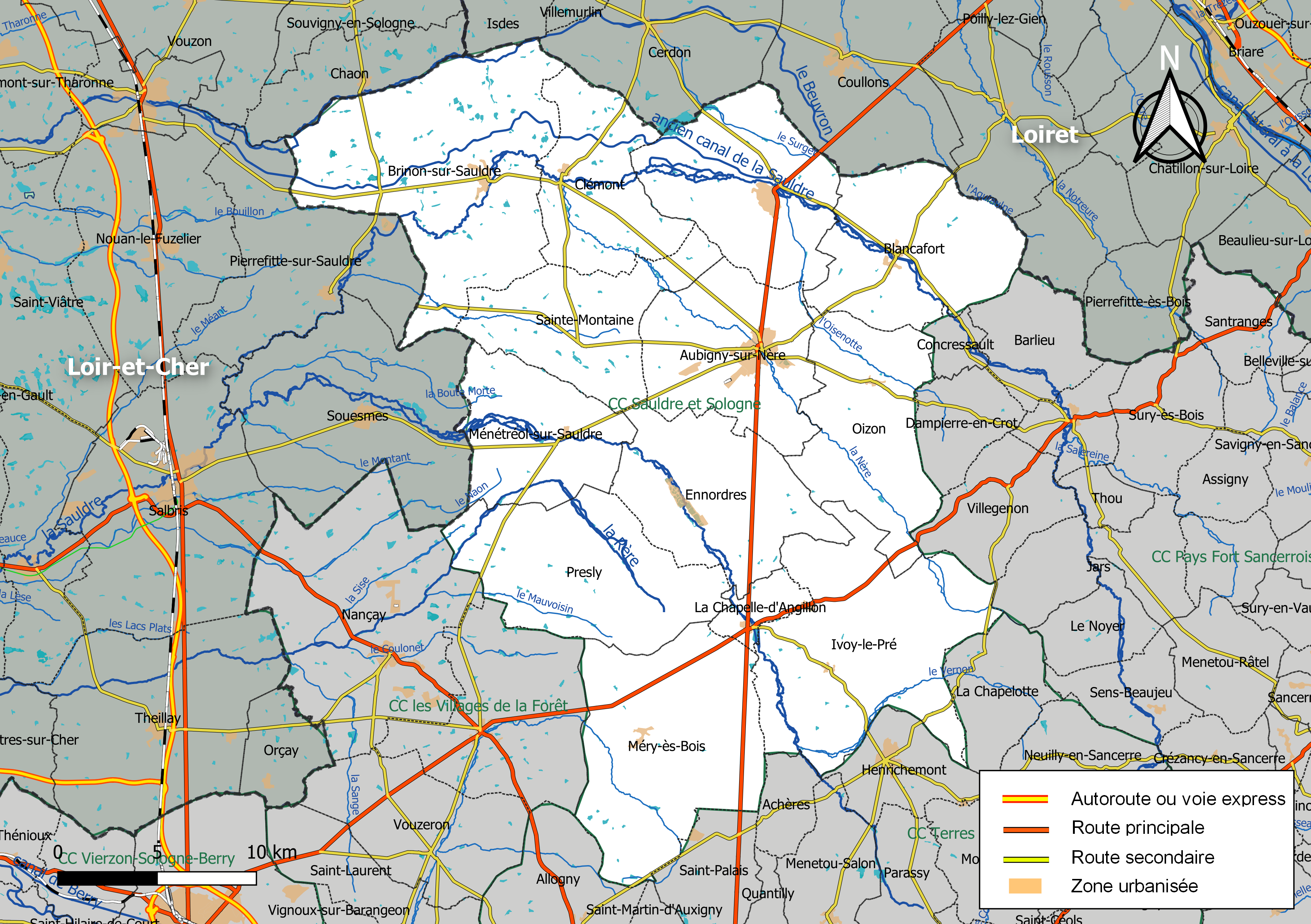 Carte géographique de la communauté de communes Sauldre et Sologne, département du Cher, France. Composition au 1er janvier 2019.